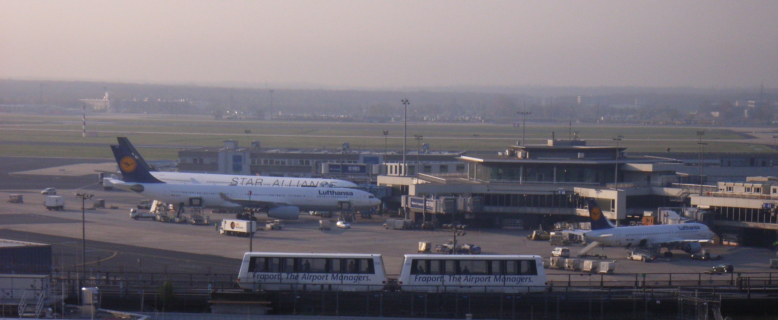 Trajno de la flughavena fervojeto "Skyline" en Frankfurto ĉe Majno